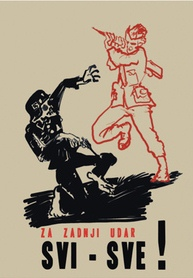 Propagandni plakat hrvatskih partizana